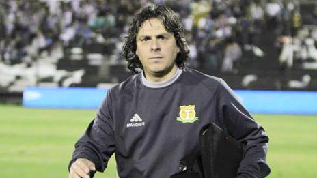 Messina en su debut como DT de Sport Huancayo.